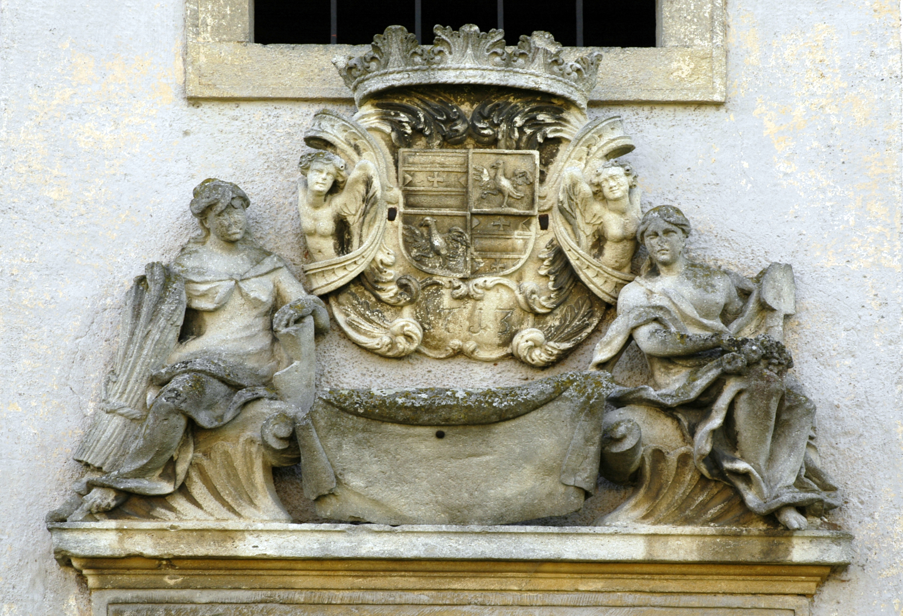 Schrattenthal - Schloss, Wappen Putz von Adlersthurm über dem Portal des Schüttkastens Dieses Bild wurde anlässlich des österreichischen Tags des Denkmals 2012 in Niederösterreich eingereicht.